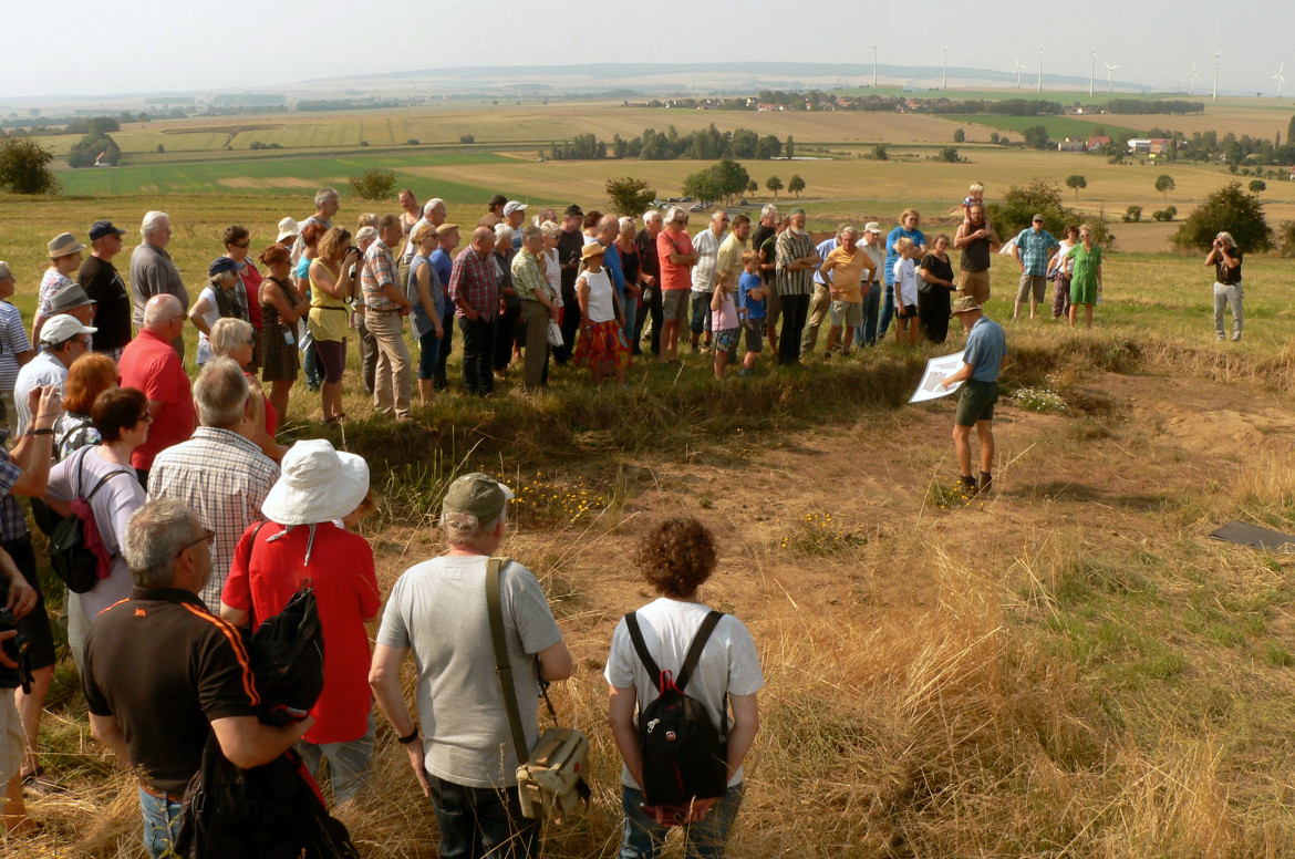 Hünenburg bei Watenstedt, Führung beim Tag der Grabung 2019